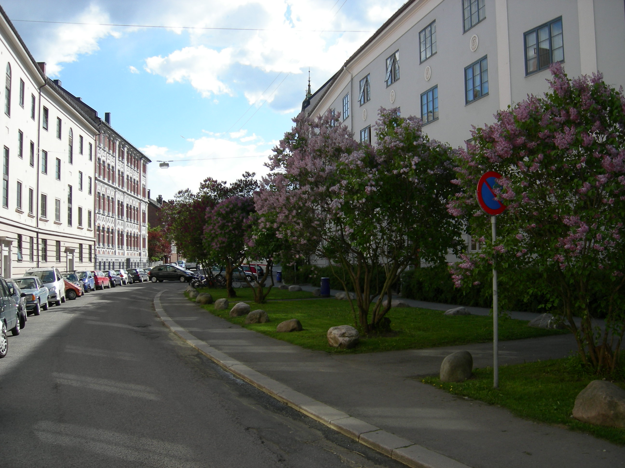 Fougstads gate på Ila i Oslo. Syrenblomstring. Tat fra gatenr. ca. 35 Bildet er tatt av brukeren og er hans eiendom.